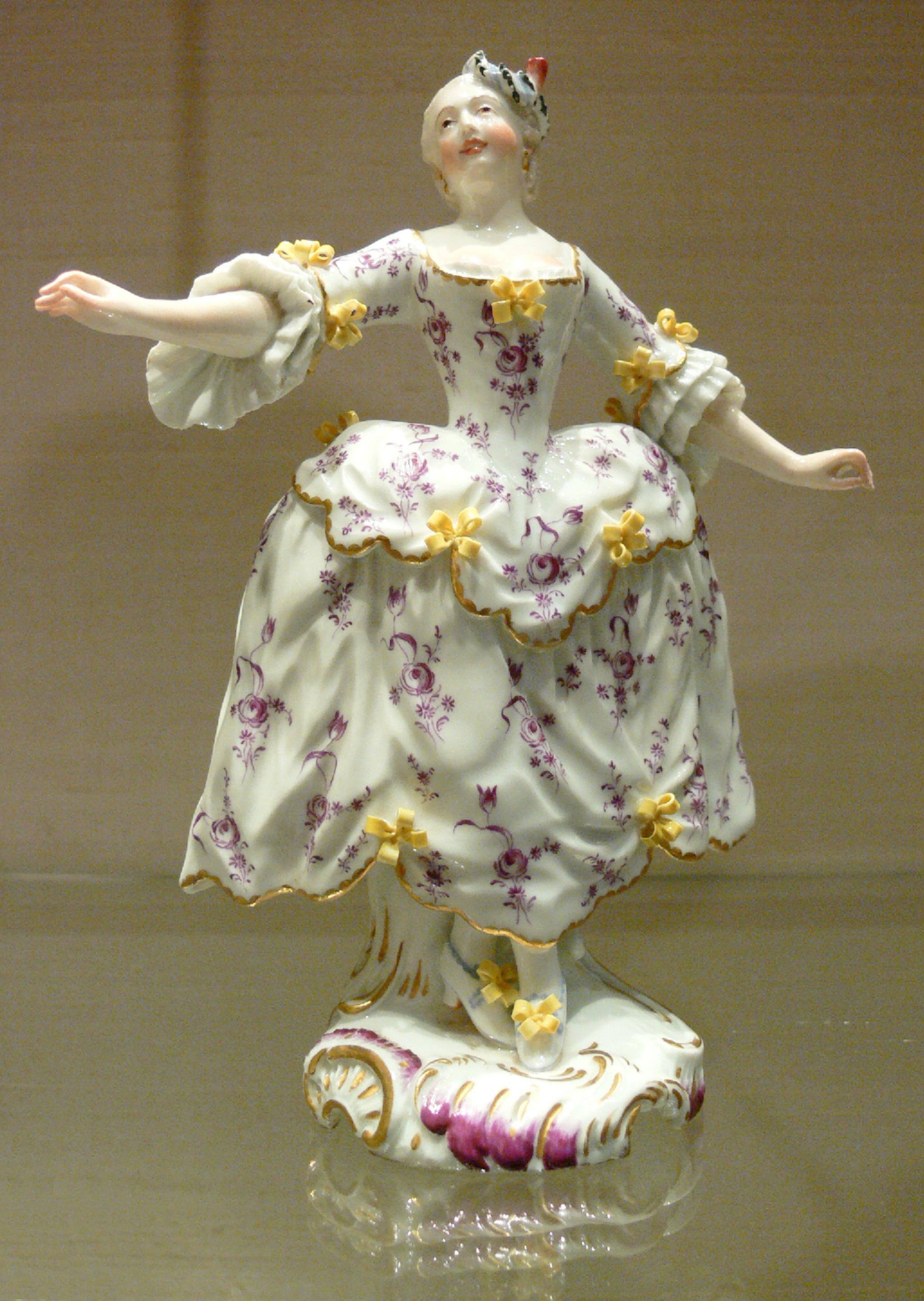 Tänzerin, Teil von: Tänzerpaar, Porzellan (Muffel-Technik), Modell: evtl. Johann Friedrich Lück; Marke: sechsspeichiges Rad (rot); Höchst, um 1755 Gallery: Reiss-Engelhorn-Museen, Mannheim